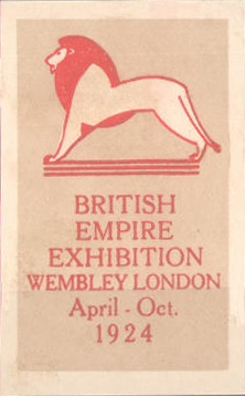 In Verbindung mit der Messe des britischen Kolonialreiches (British Empire Exhibition) veröffentlichte Ansichtskarte